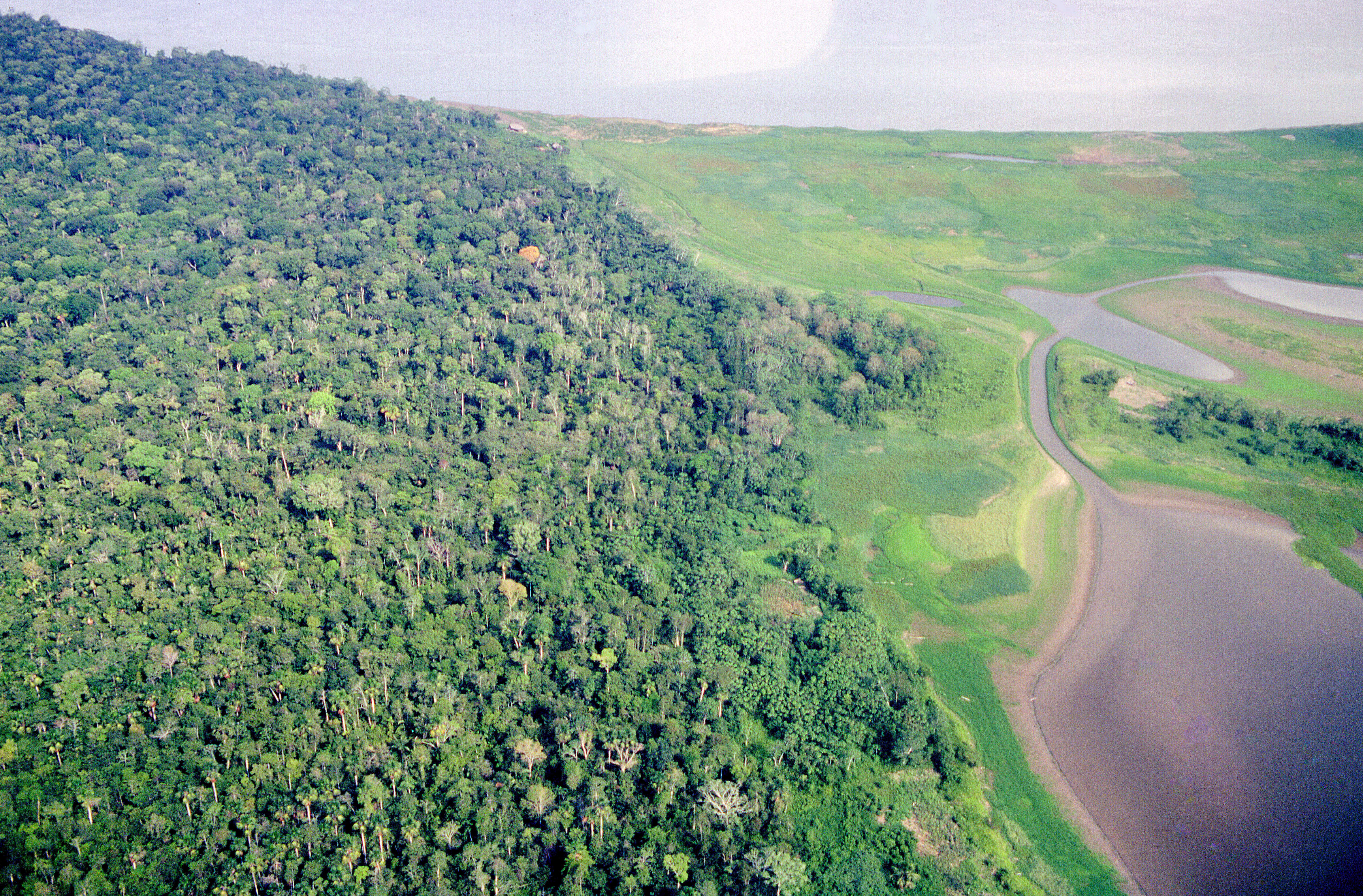 Iquitos_et_l'Amazonie_977.jpg